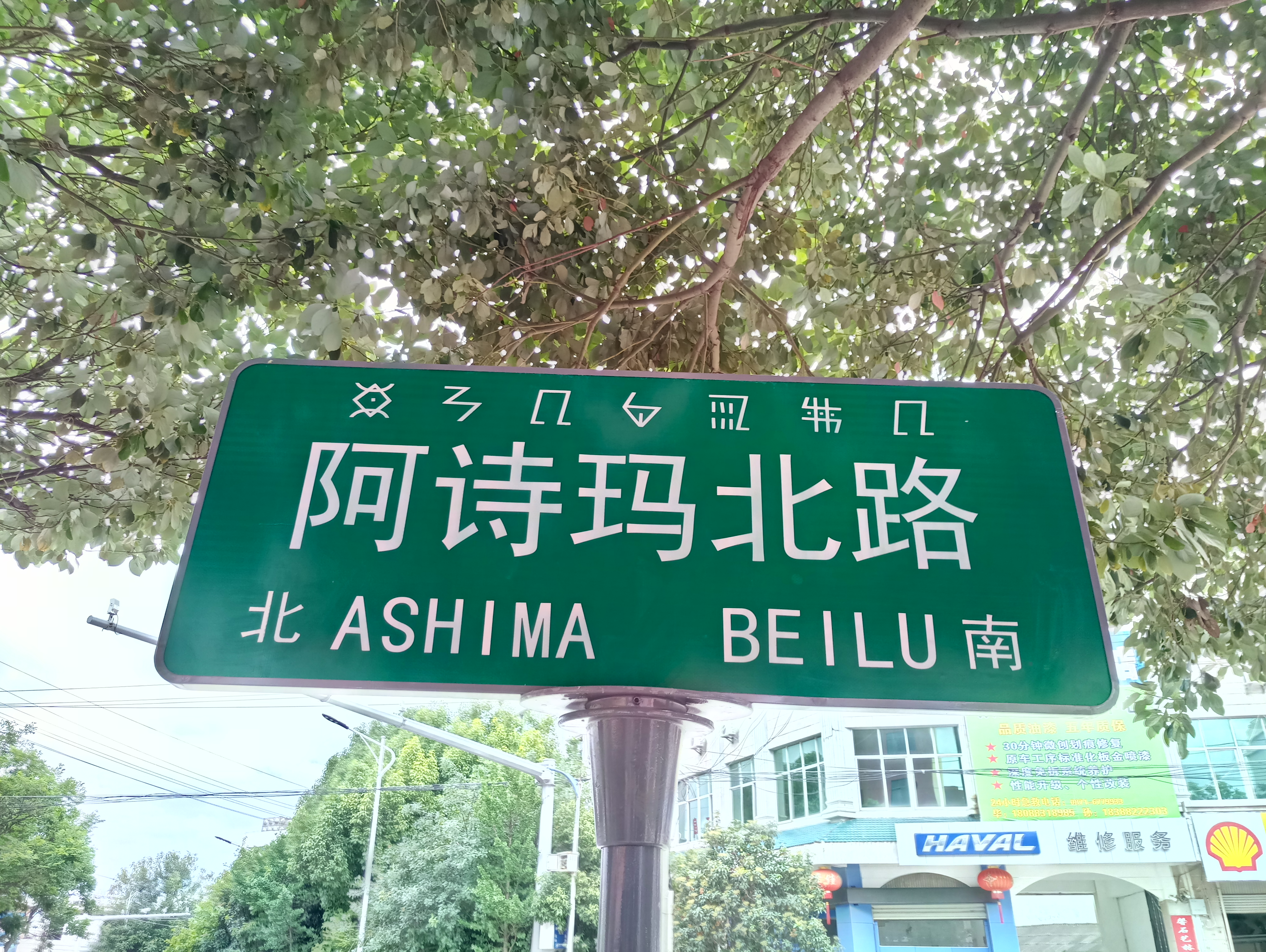 中文（中国大陆）: 石林县阿诗玛北路的路牌